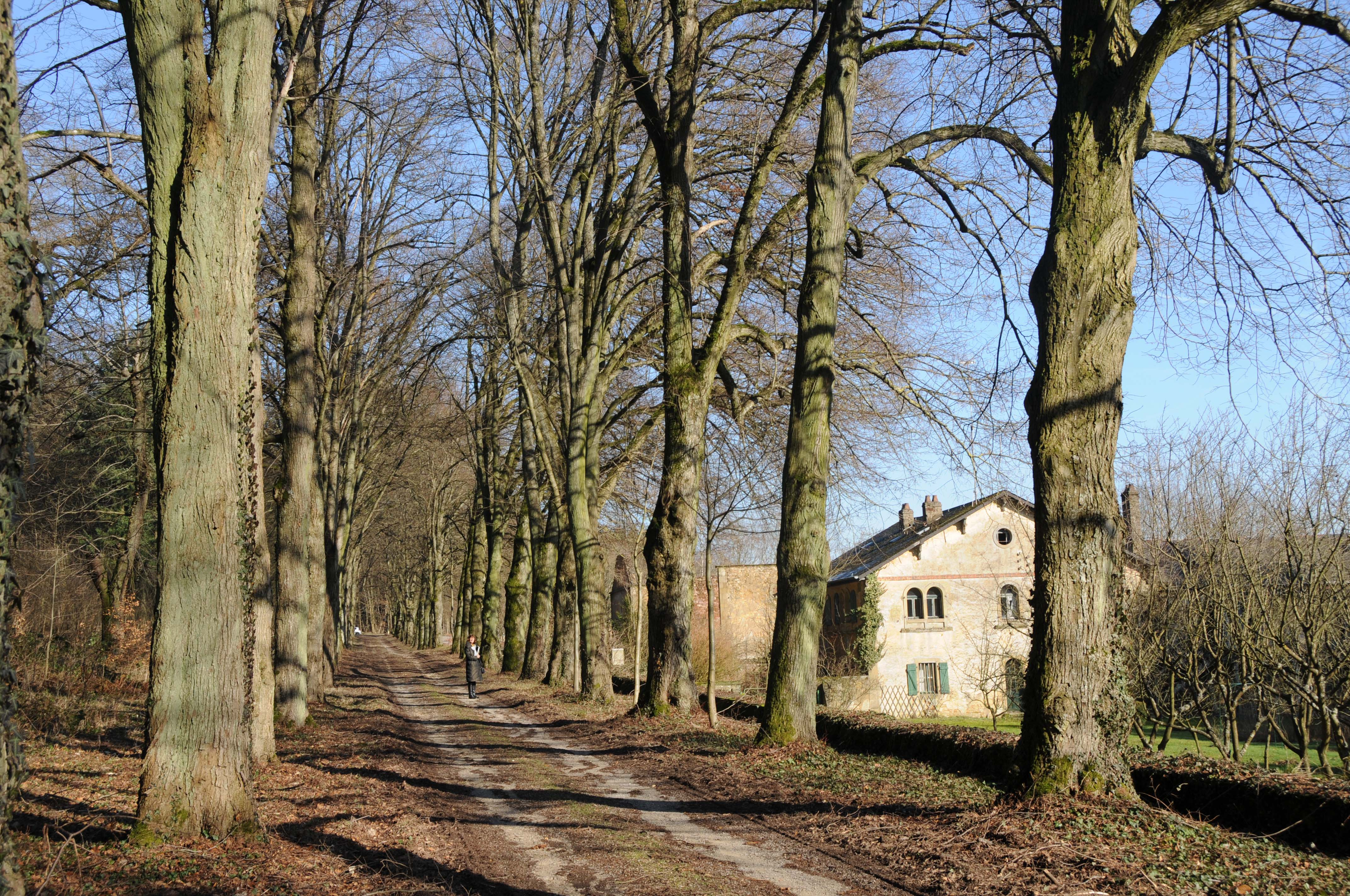 Lannenallee um Scheedhaff.